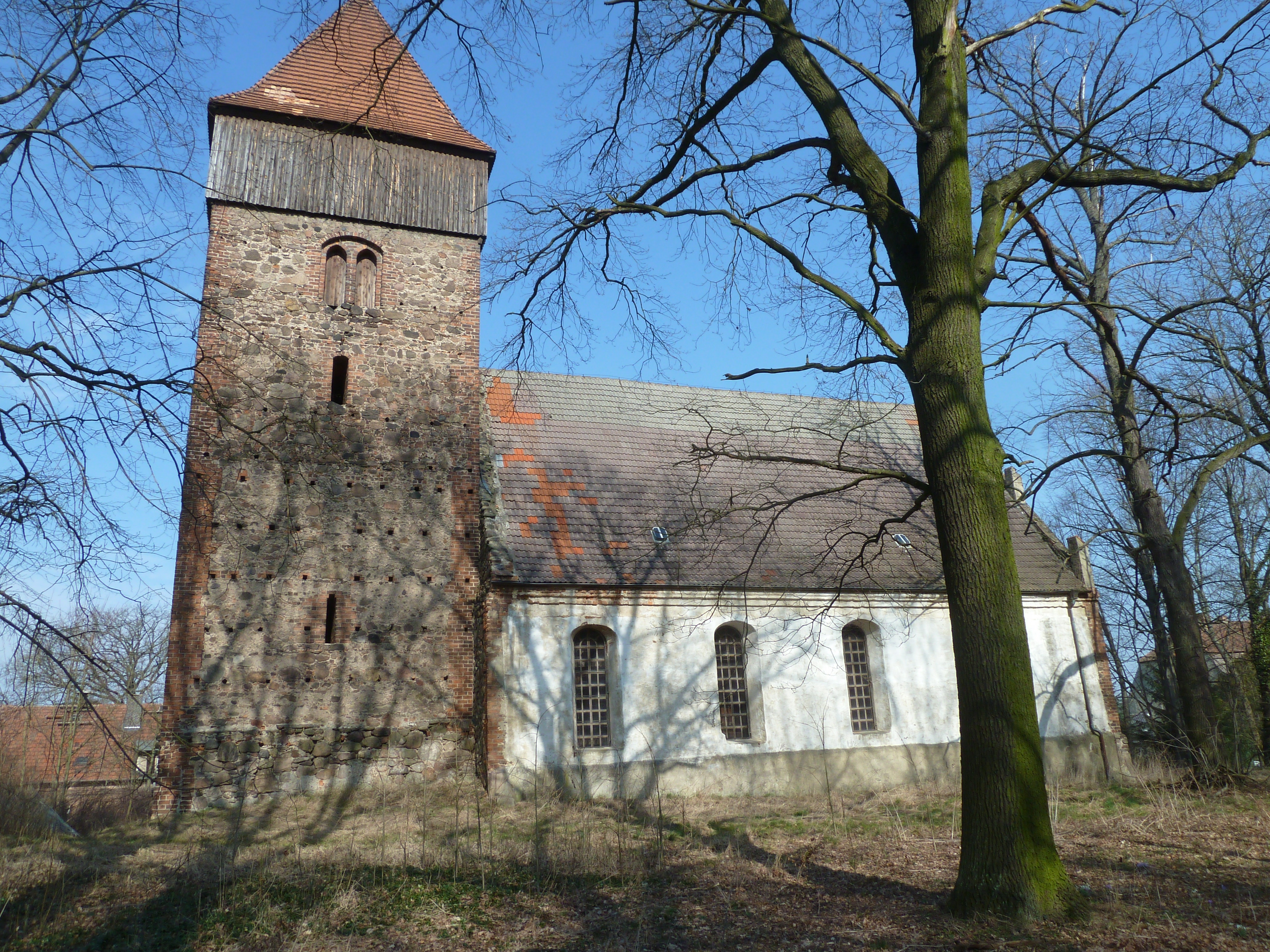 Kirche Steinitz, Ansicht von Süden